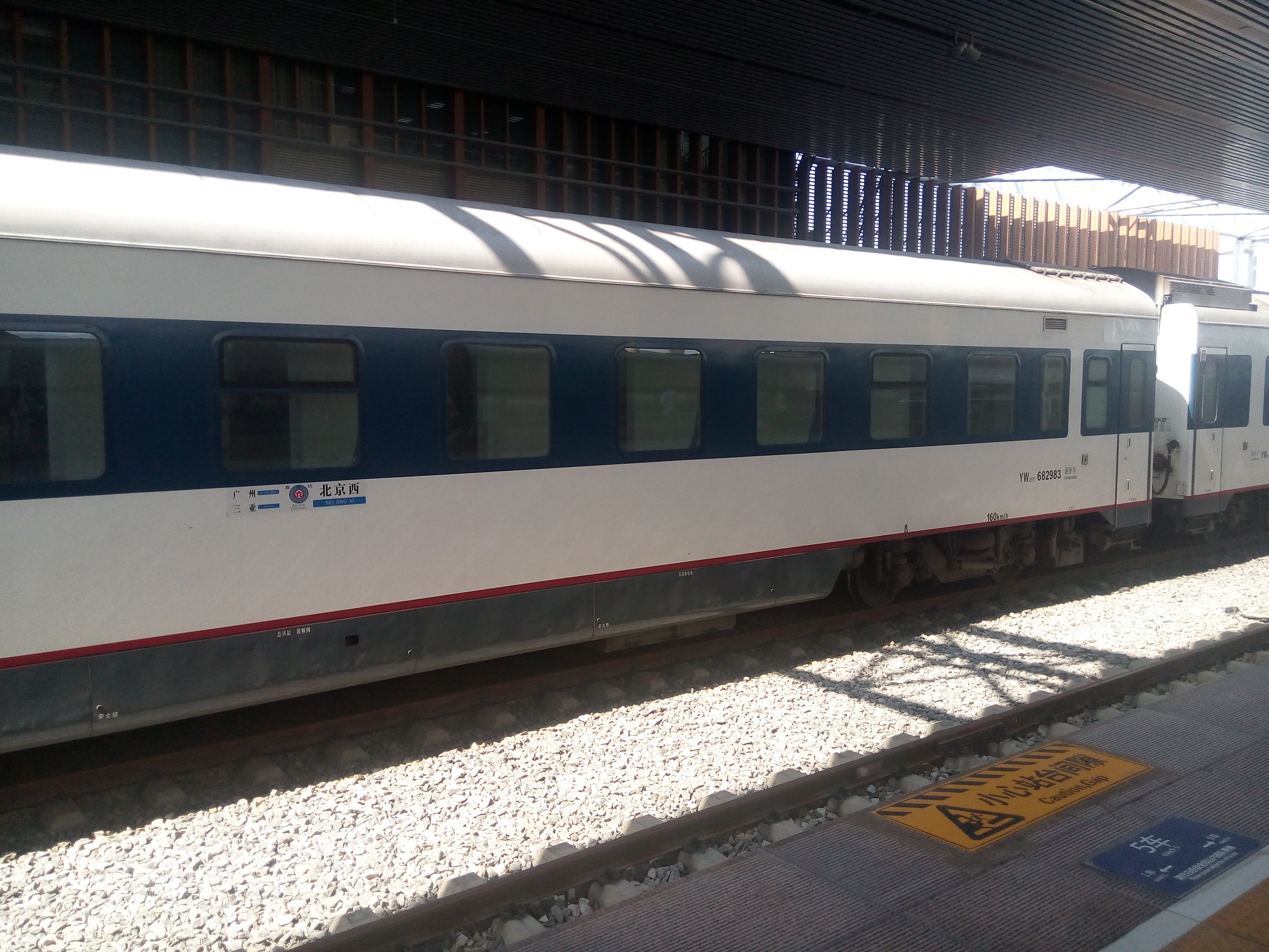 三亚站的Z201/202次列车